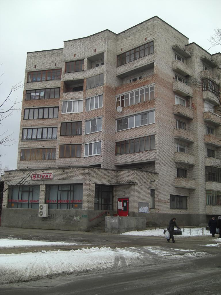 Жилой дом в микрорайоне Хохлово поле Гатчины